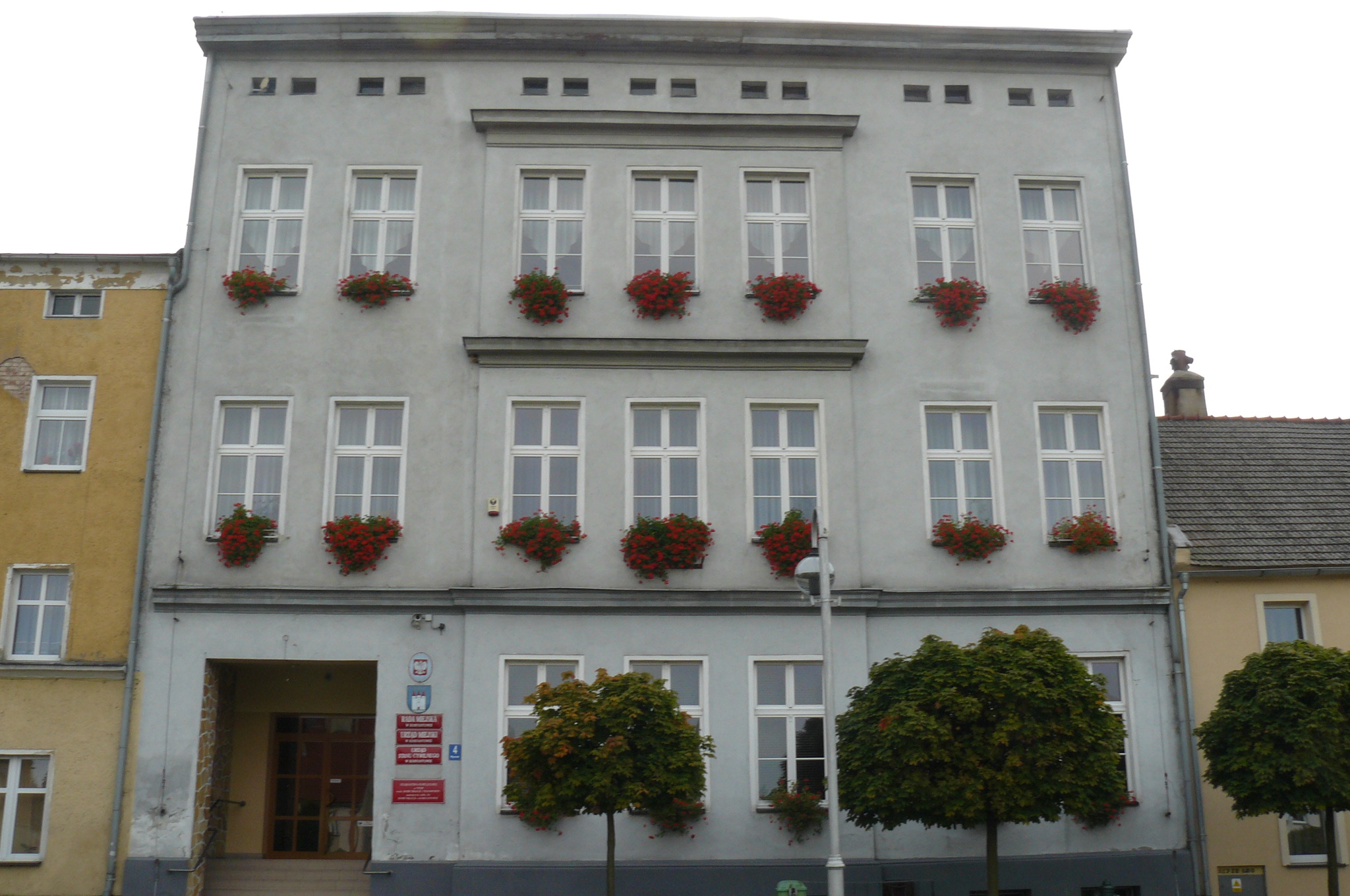 Rynek w Korfantowie.